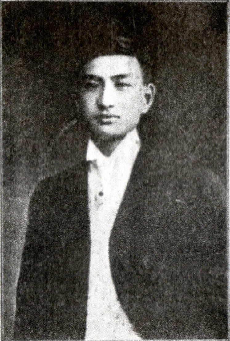 男爵・古河虎之助肖像。